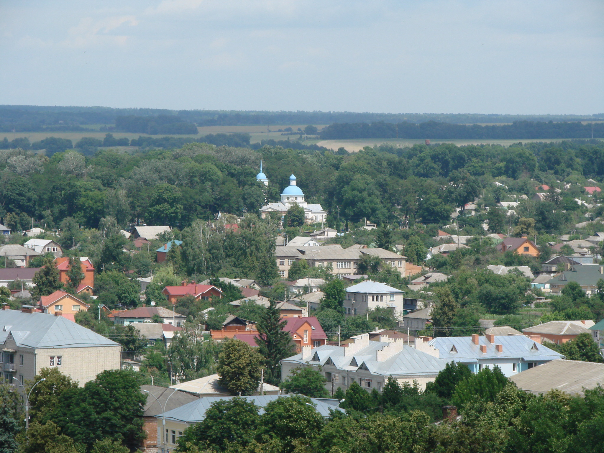 Вознесенська церква, Глухів, Вознесенське кладовище